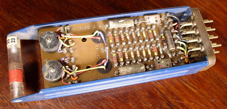 TX-2 module, top view